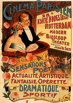 Bioscoopaffiche, Nederlands Filmmuseum, Amsterdam